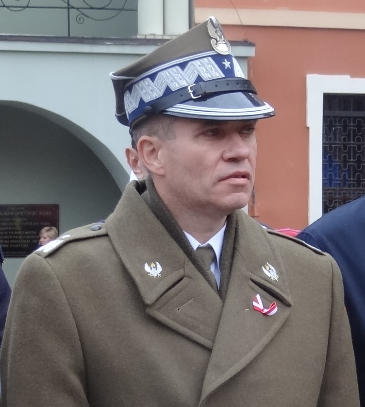 Gen. bryg. Dariusz Górniak